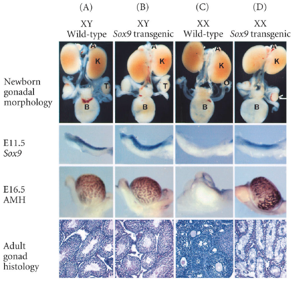 Capacidad de Sox9 para generar testículos. A. Un embrión de ratón XY tipo salvaje expresa Sox9 en la cresta genital a los 11.5 días, factor inhibidor del conducto de Müller (AMH) en las células de Sertoli de la gónada embrionaria a los 16.5 días y finalmente forma los testículos descendidos (T) con túbulos seminíferos. B. Un embrión XY con el transgén Sox9 (un control para los defectos del transgén) también muestra la expresión de Sox9, la expresion de AMH y testículos descendidos con túbulos seminíferos. C. Los embriones XX tipo salvaje no muestran expresión de Sox9 ni de AMH. Estos construyen ovarios con células foliculares maduras. D. Un embrión XX con el transgen Sox9 expresa el gen Sox9 y tiene AMH en sus células de Sertoli de 16.5 días. Estos tienen testículos descendidos, pero los túbulos seminíferos carecen de espermatozoides (debido a la presencia de dos cromosomas X en las células de Sertoli). R, riñones; S, glándulas suprarrenales; V, vejiga; T, testículo; O, ovario.